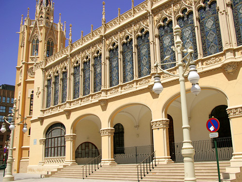 Palacio de la Exposición, Valencia, Spain.